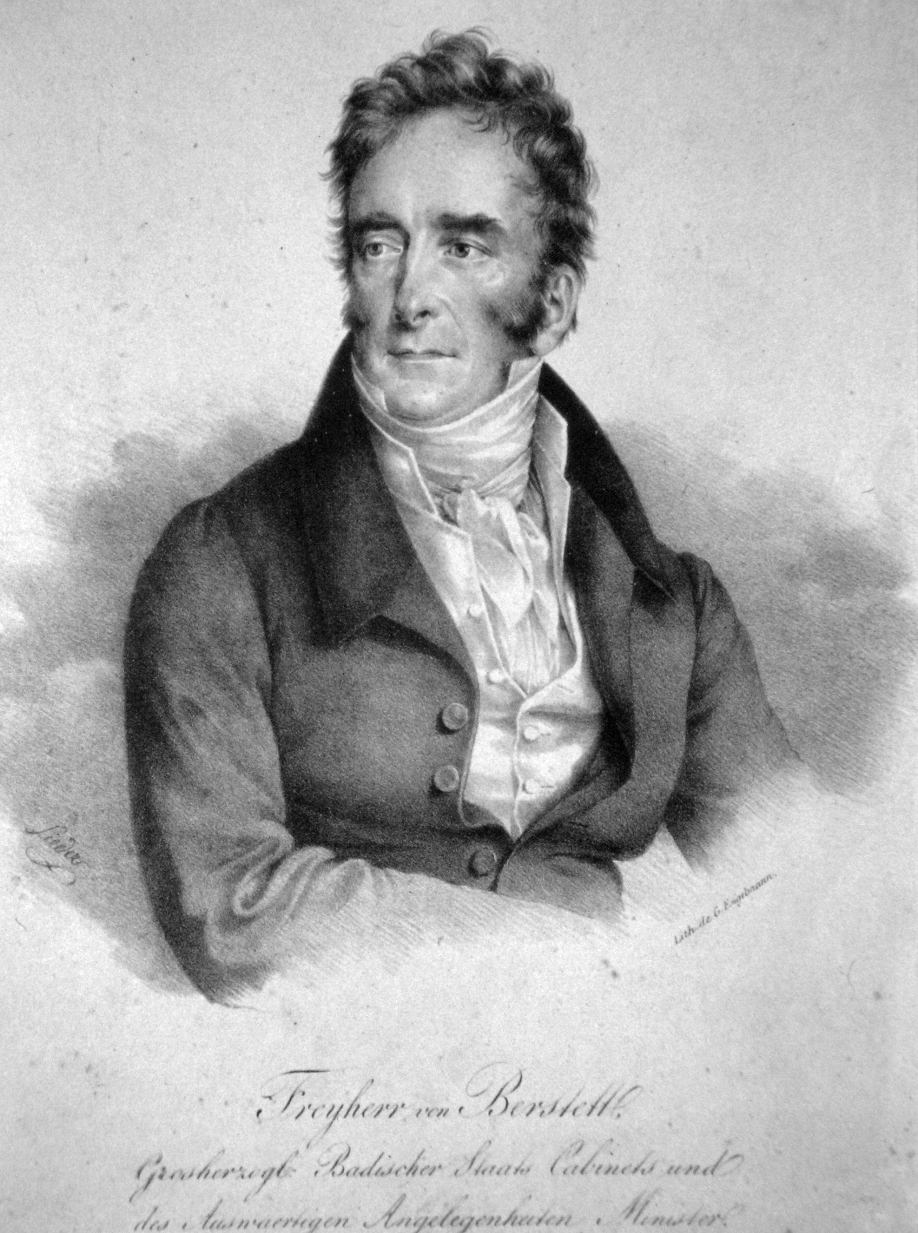 Wilhelm Leopold Freiherr von Berstett (1769-1837), badischer Diplomat und Minister.